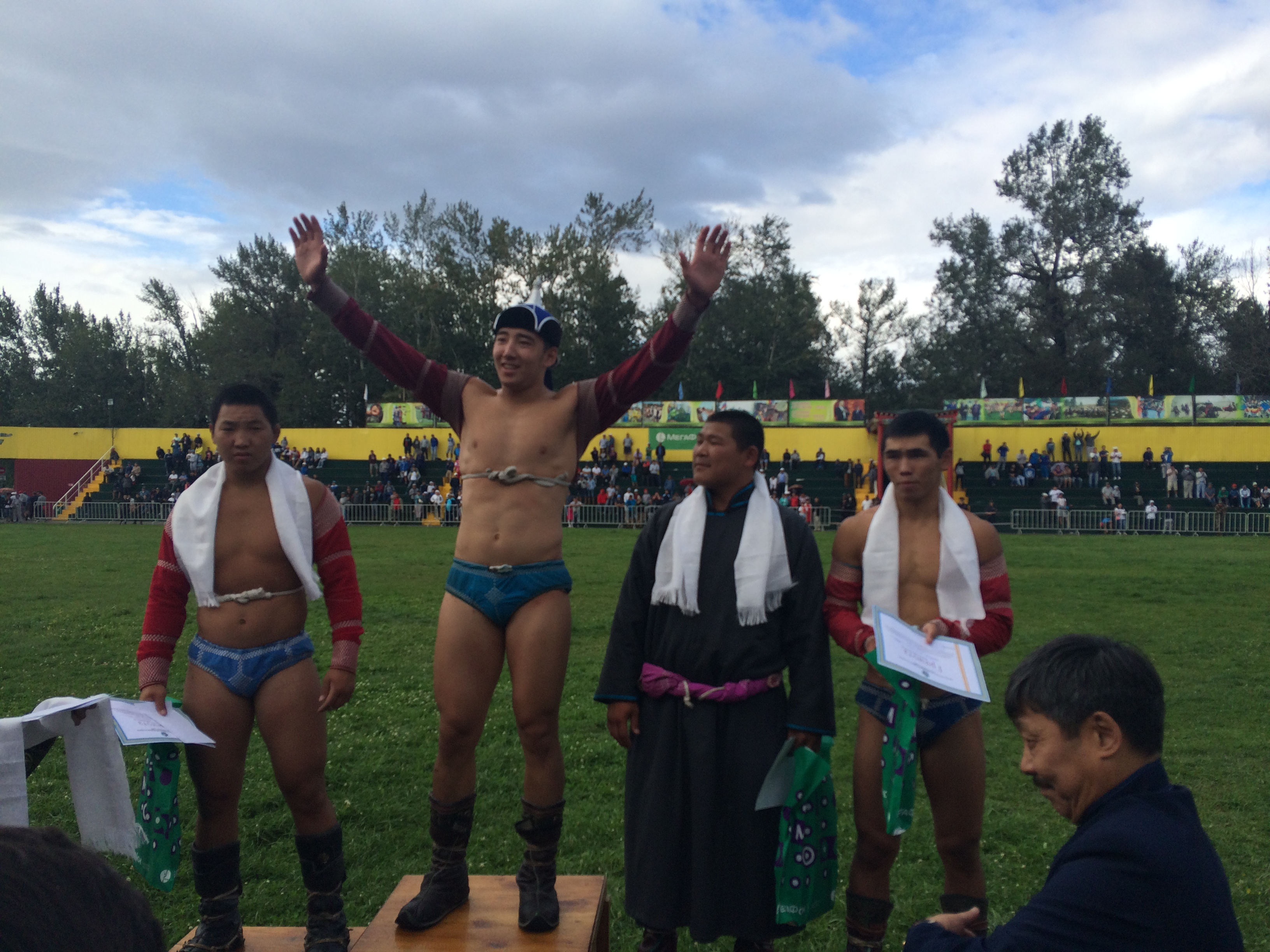 Победитель - Баткар Баасаң. 13 августа 2016 Тыва дыл: Баткар Баасаң шүүлген. Аныяктар аразынга Наадым Хүрежи. 2016ч 8а 13х.